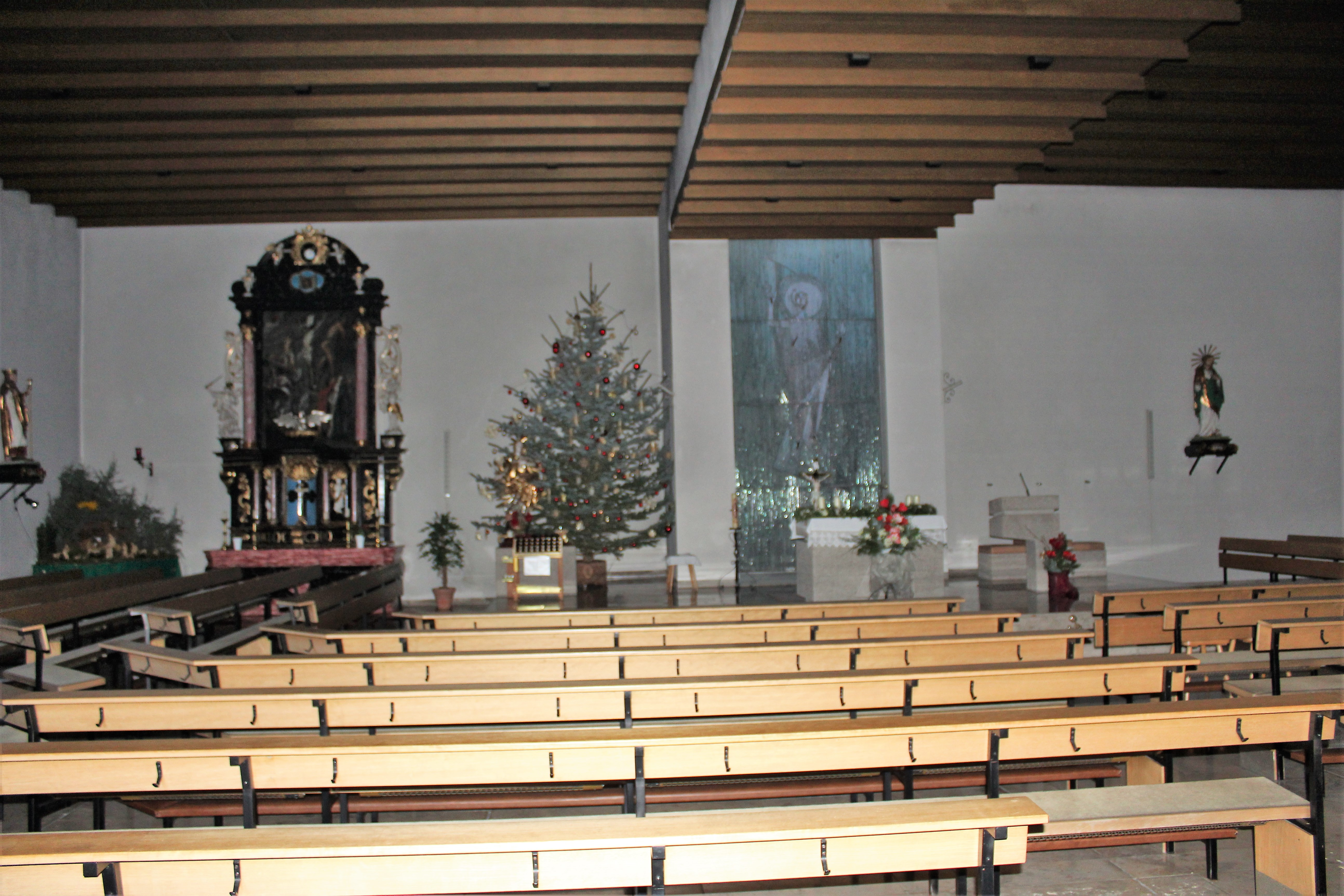 Inneres der Kirche